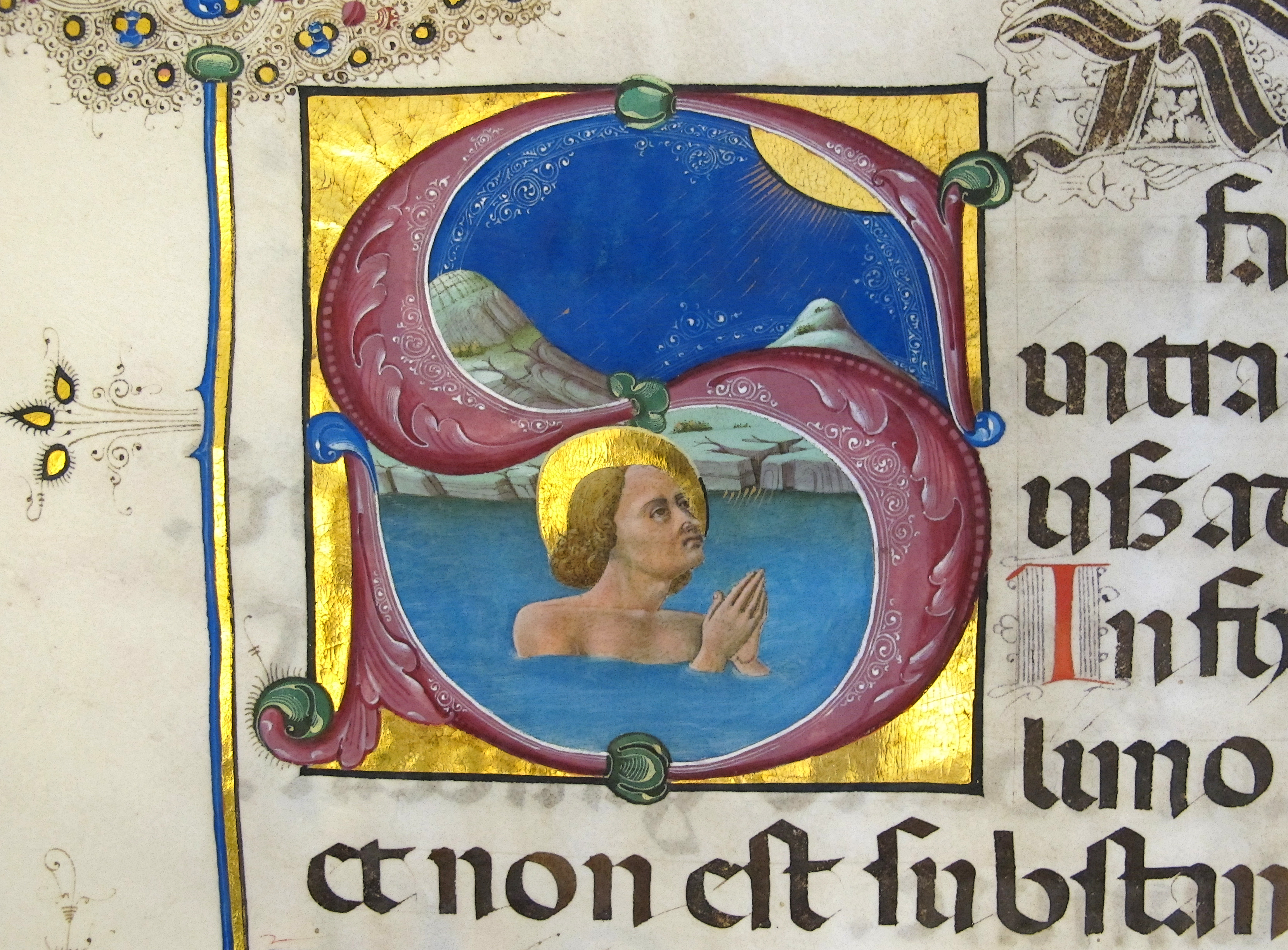 Museo della Cattedrale This is a photo of a monument which is part of cultural heritage of Italy.